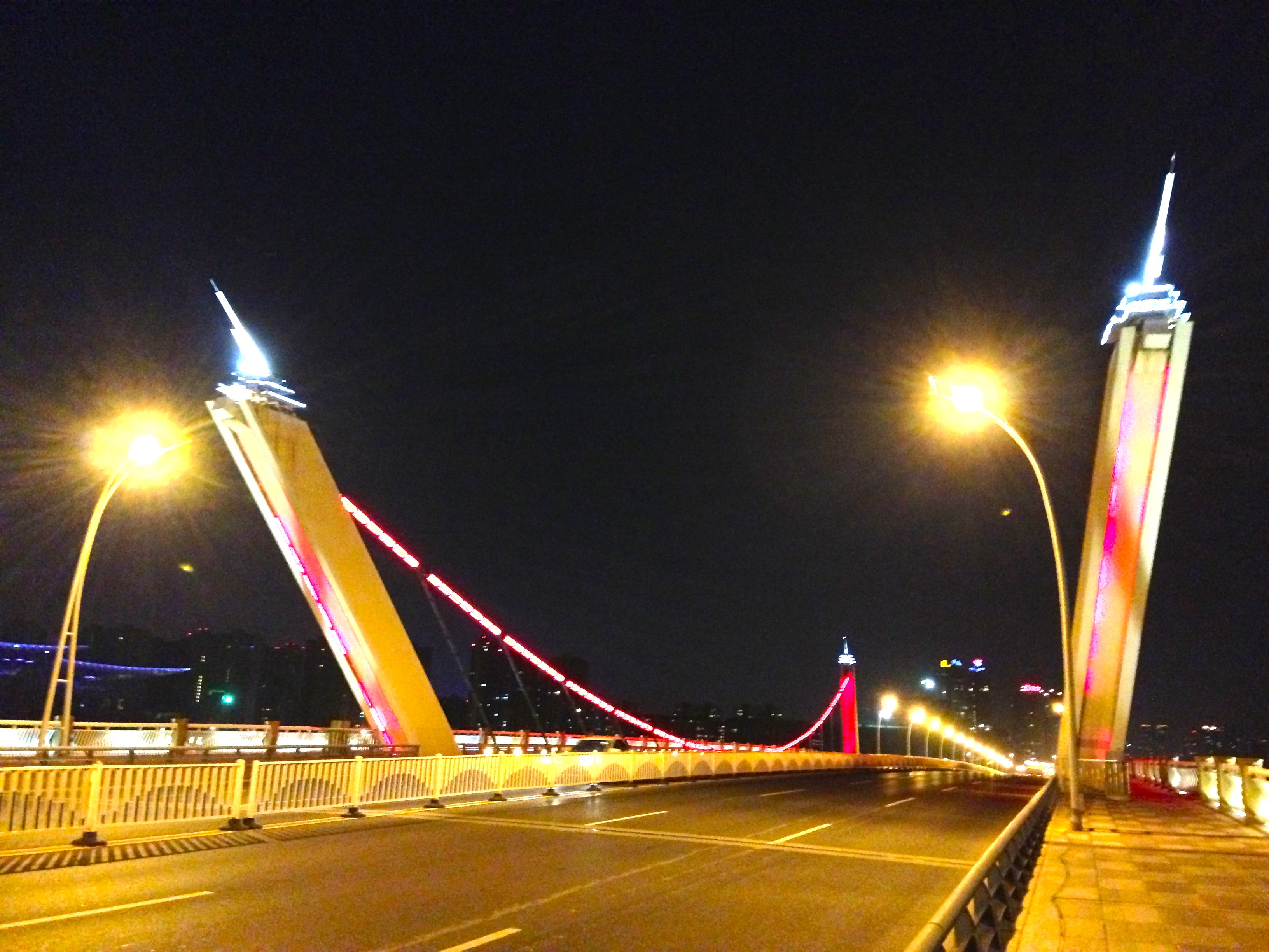 Binhu, Wuxi, Jiangsu, China